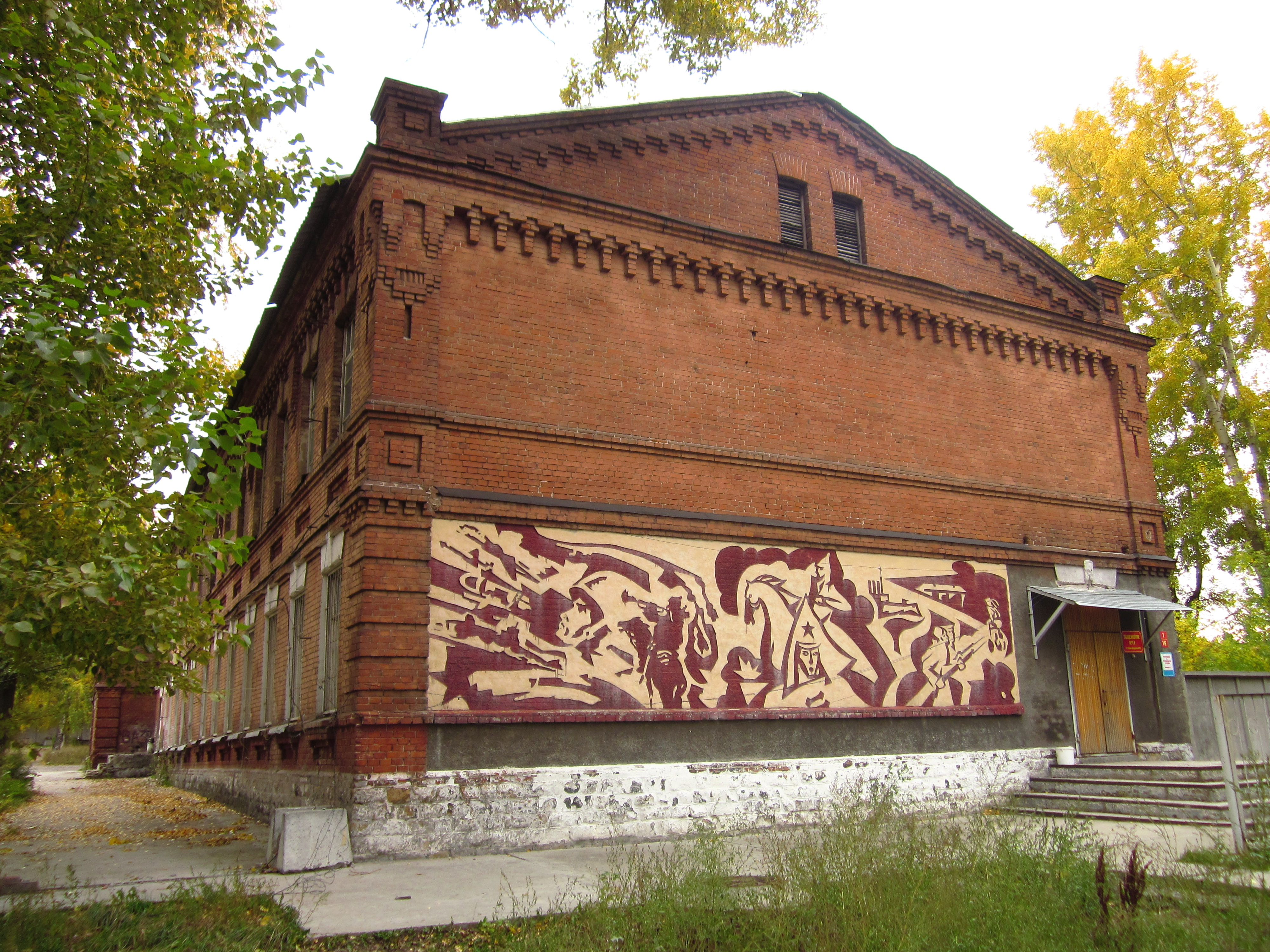 Военный городок. Пулемётная команда